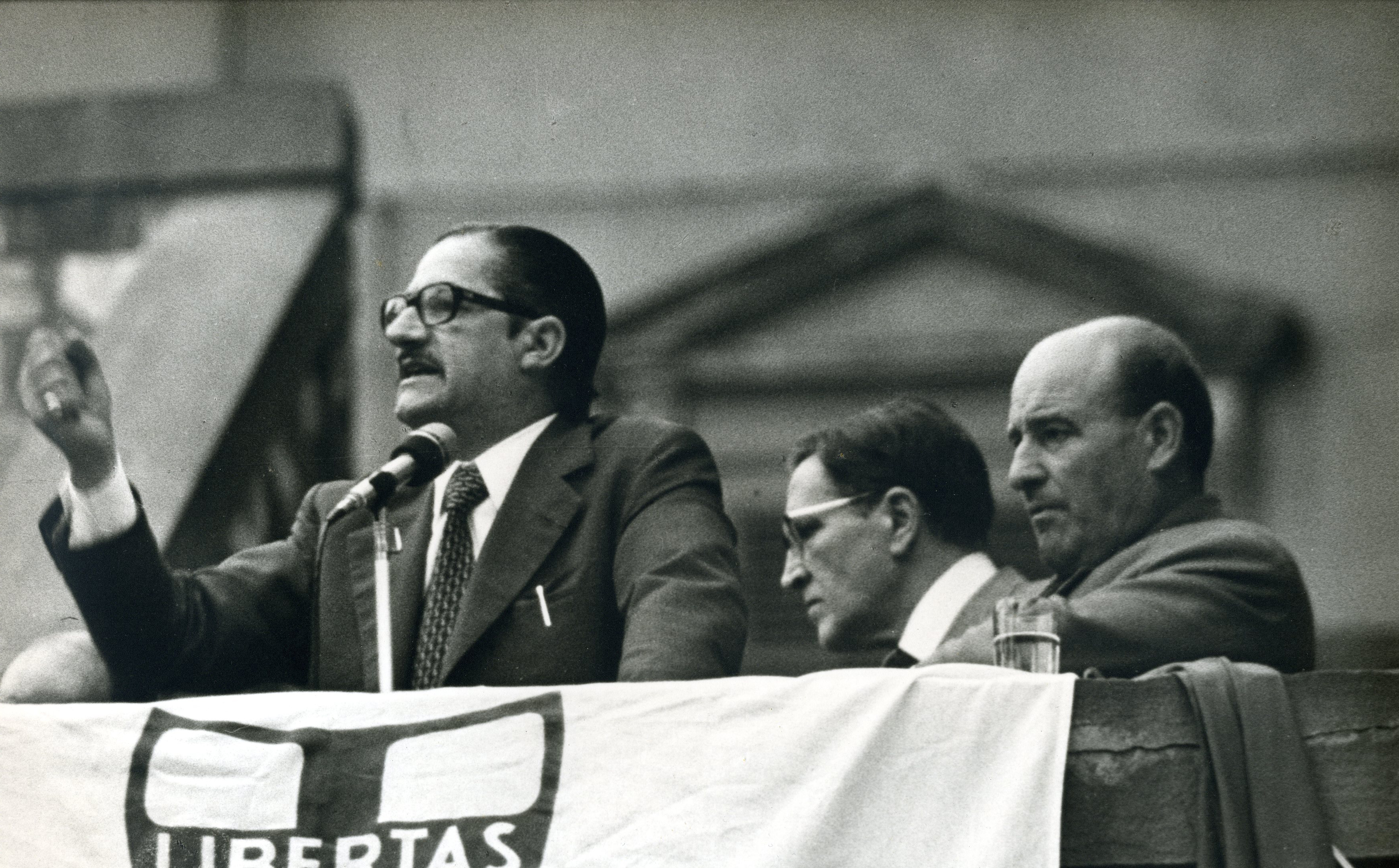 Jorio Borchi in uno dei molti comizi in piazza